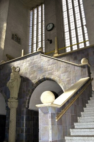 Treppenaufgang im Schlachthof Bad Kissingen